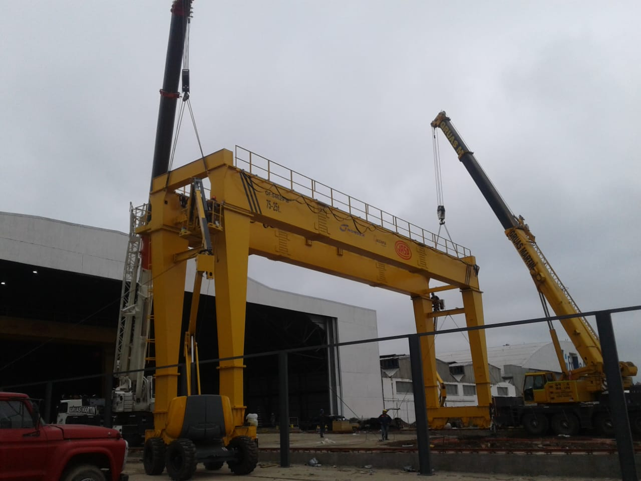 Grúa puente tipo pórtico en proceso de montaje, en fábrica de turbinas generadoras eólicas.